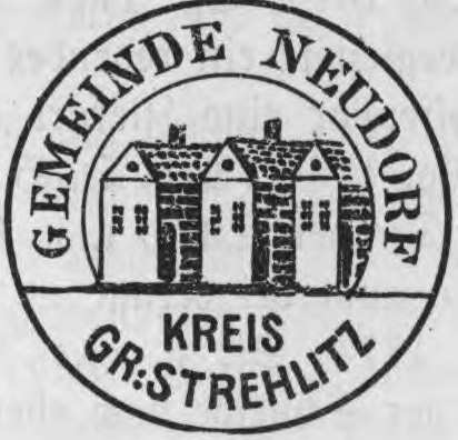 Siegel der Gemeinde Neudorf im Kreis Groß Strehlitz 1910.